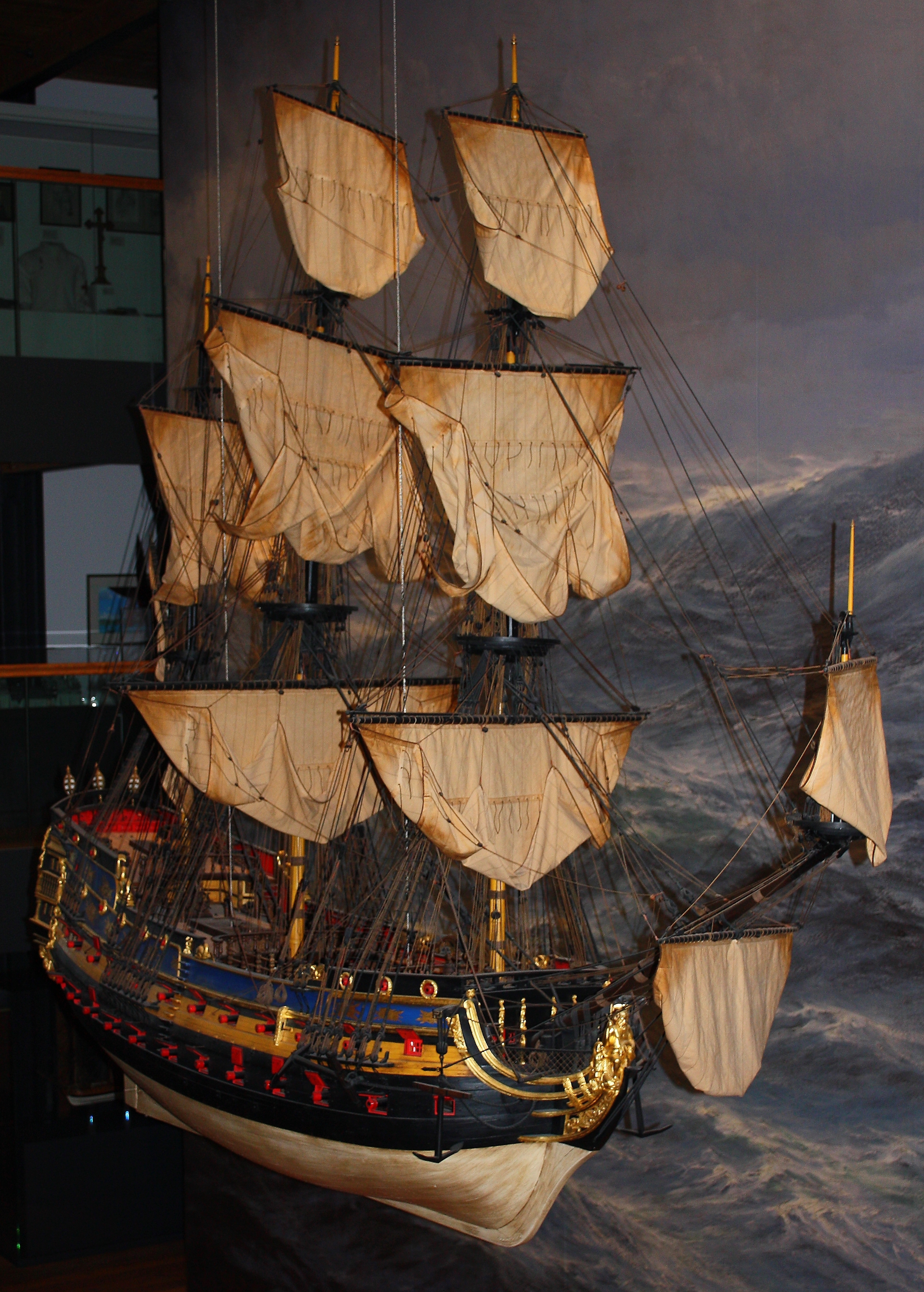 Totale Bugansicht des Konvoischiffes Wapen von Hamburg (III)